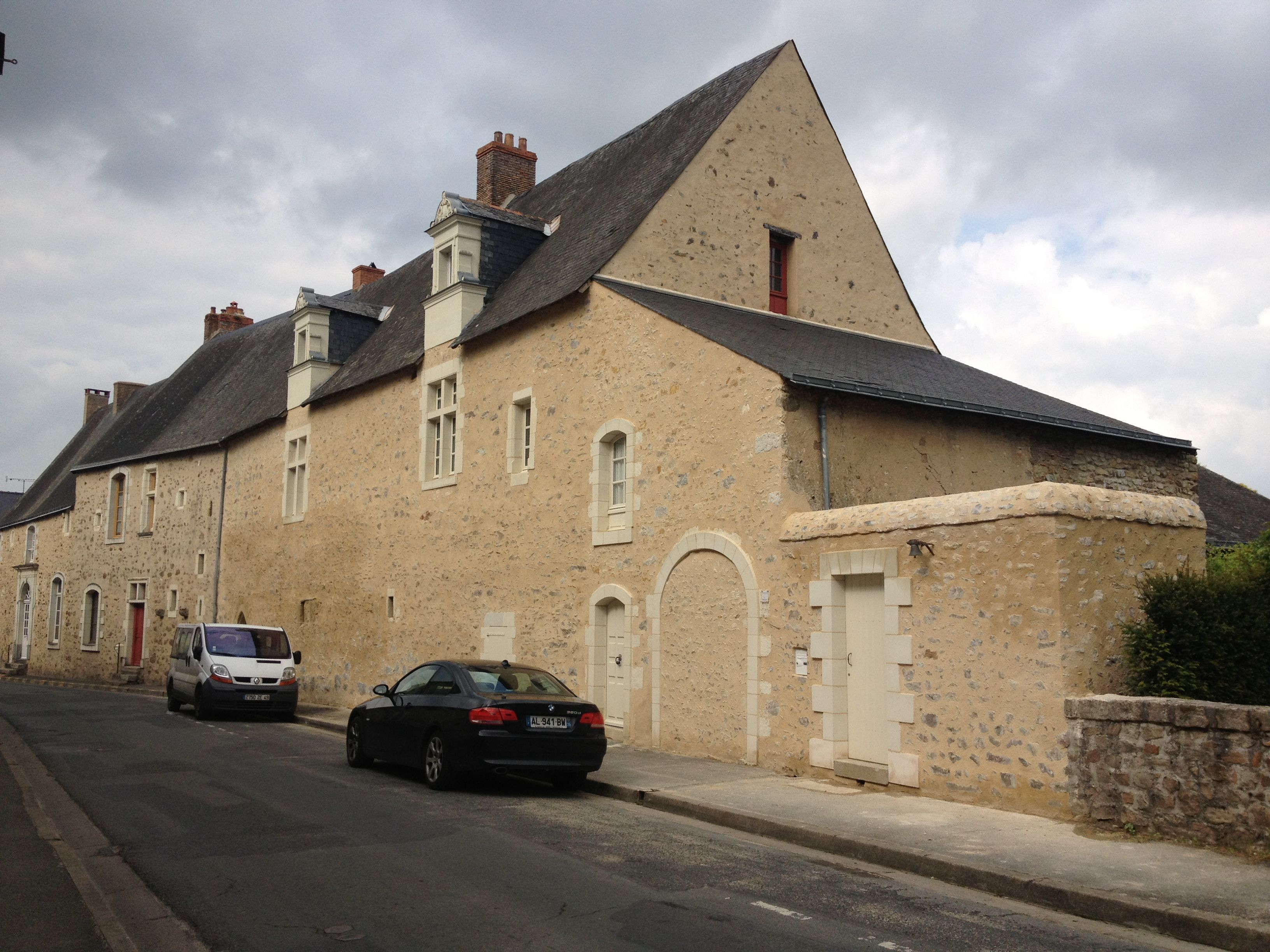 Domaine de la Panne (façade rue) situé à Morannes (Maine-et-Loire, France).